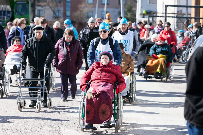 Ulkoilukeikka